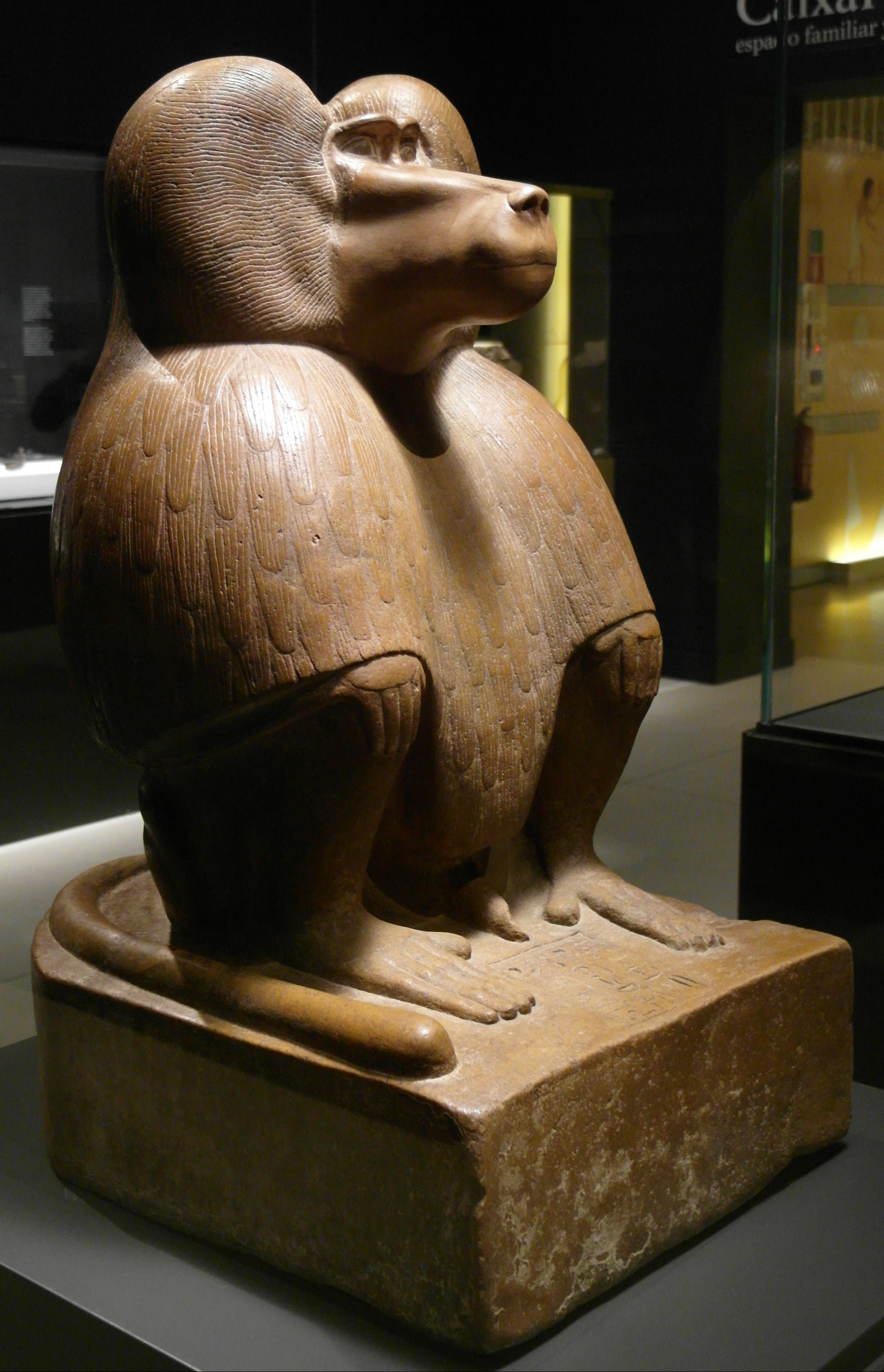 Estatua de un babuino en cuclillas. Dinastía XVIII, reinado de Amenhotep III (hacia 1390-1352 a. C.). EA 38.